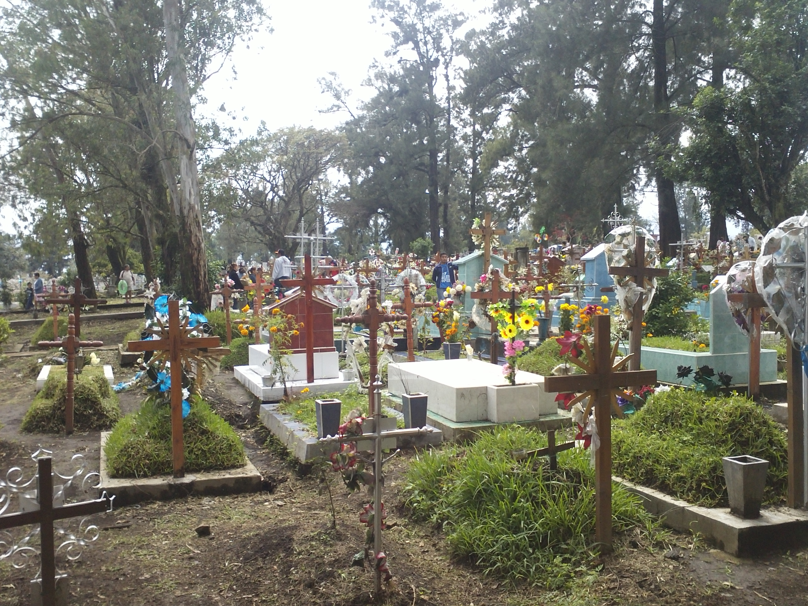 Sección de cruces de madera en el panteón de Orizaba